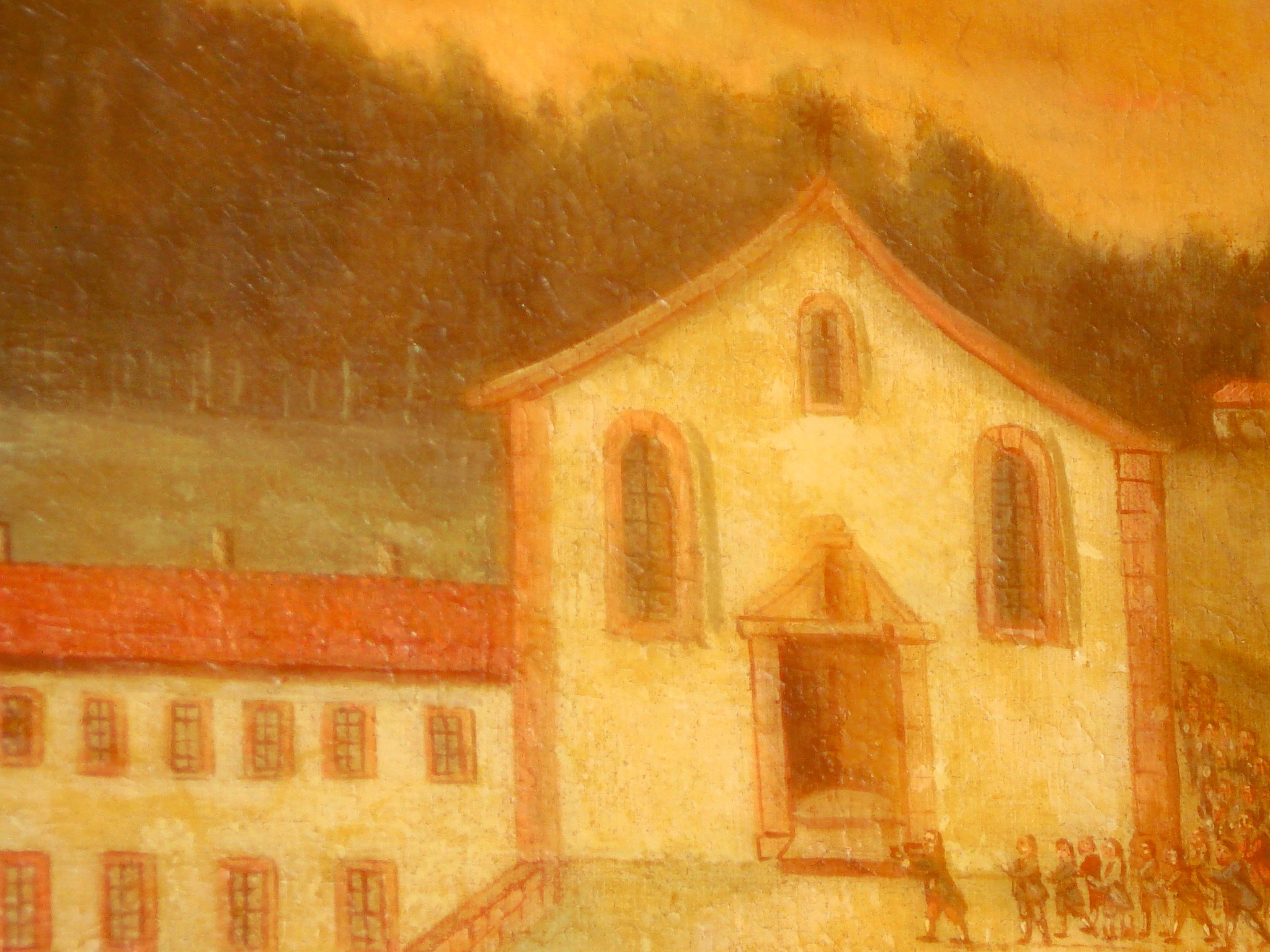 Thierenbach : Détail de l'ex-voto de Wattwiller montrant comment le peintre a résenté le prieuré en 1797